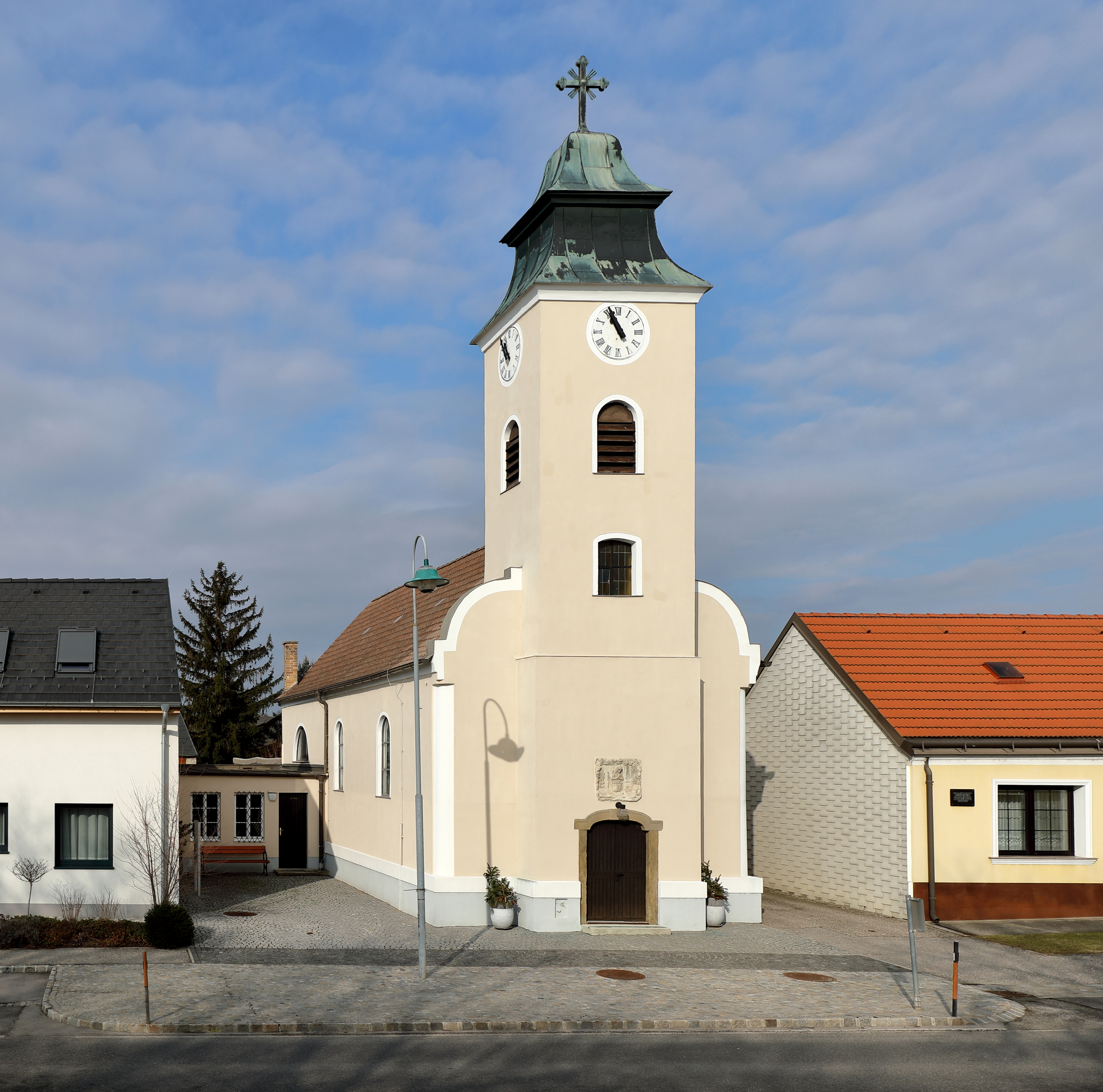 Südostansicht der röm.-kath. Filialkirche Erscheinung des Herrn in Eibesbrunn, ein Ortsteil der niederösterreichischen Marktgemeinde Großebersdorf. Der schlichte Saalbau mit Fassadenturm und Westchor wurde 1814/1815 errichtet und bei der Restaurierung 1966 erfolgte gleichzeitig eine Erweiterung nach Westen nach Plänen des Architekten Erwin Plevan.